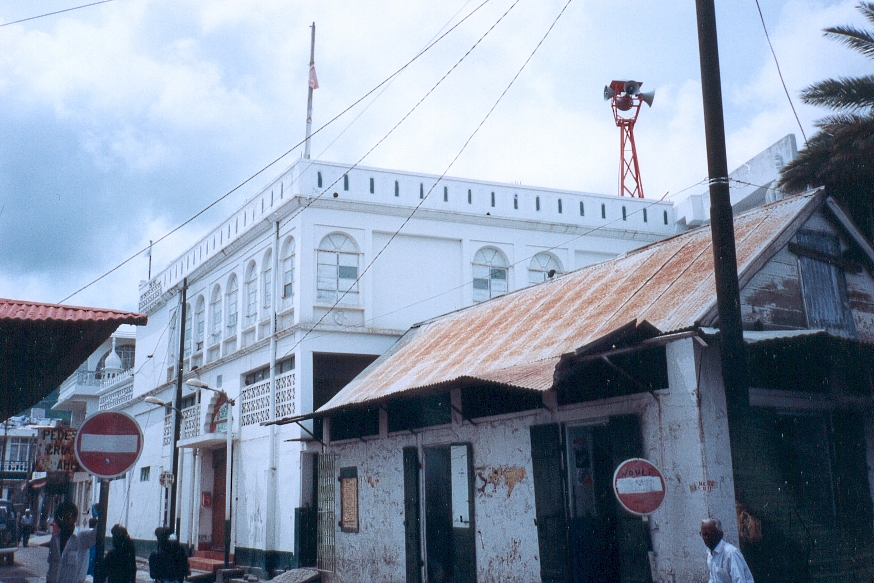 Auteur de la photographie : FC Georgio Sujet : Mosquée de Port Louis Lieu : Port Louis, Ile Maurice Date : Décembre 1990